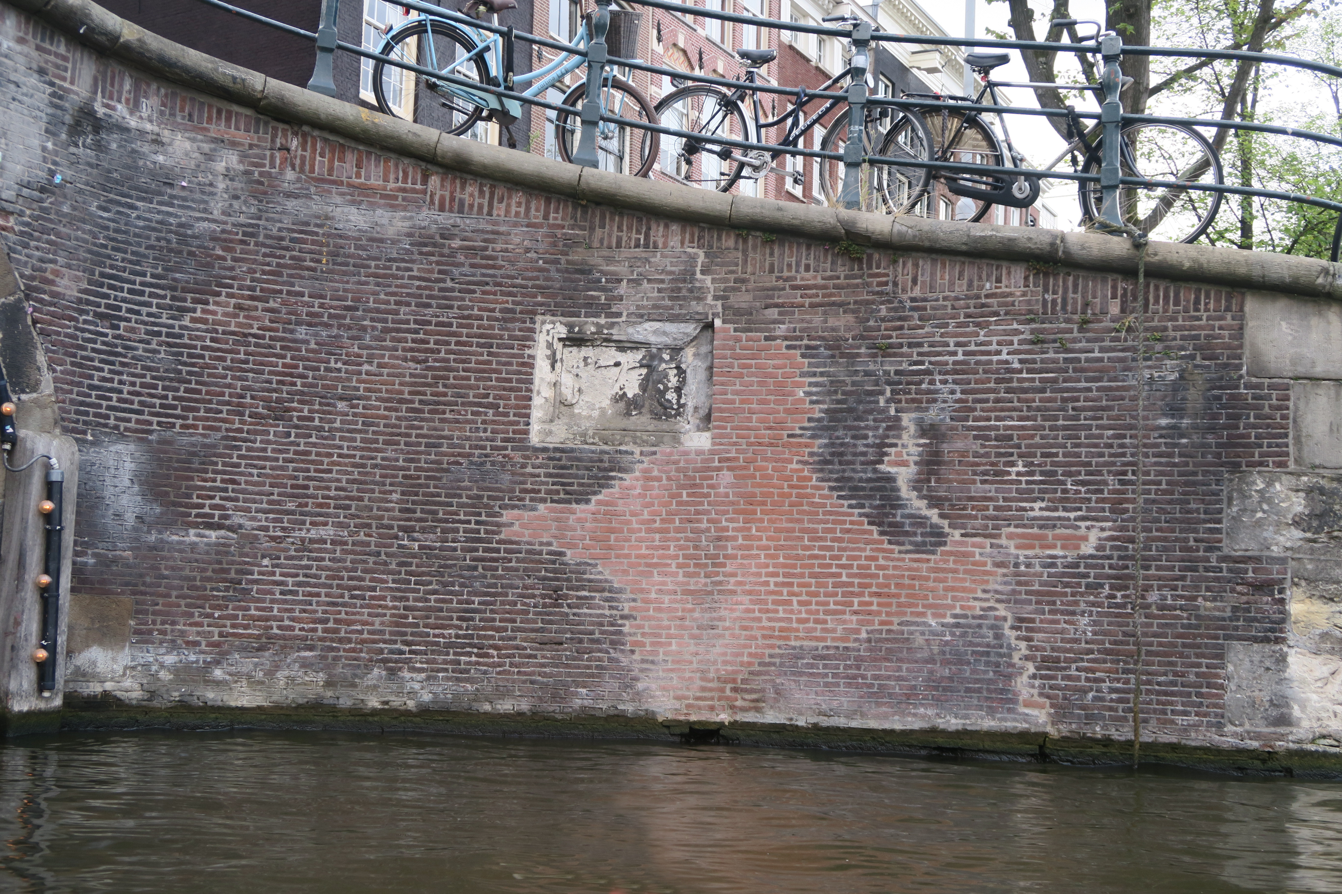 Datumsteen in de F.H. Oetgensbrug, met nieuw metselwerk